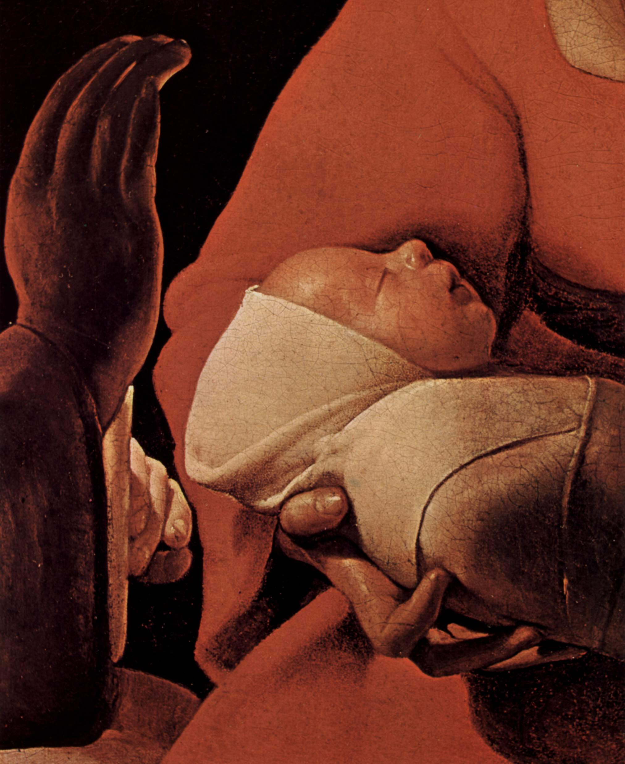 Geburt Christi?